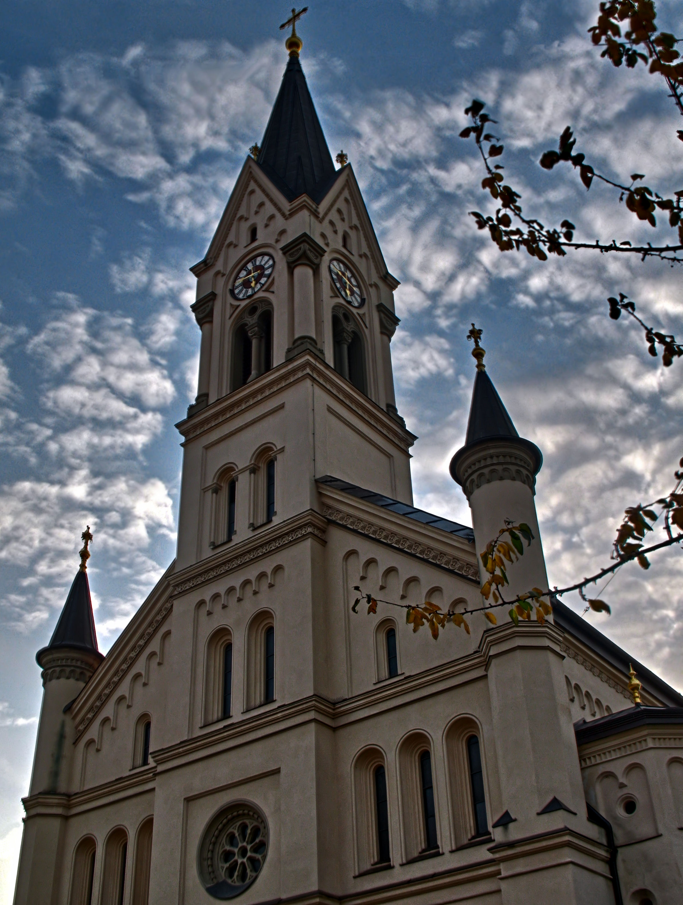 München, Schwanthalerhöhe, Kirche St. Benedikt Vorderseite